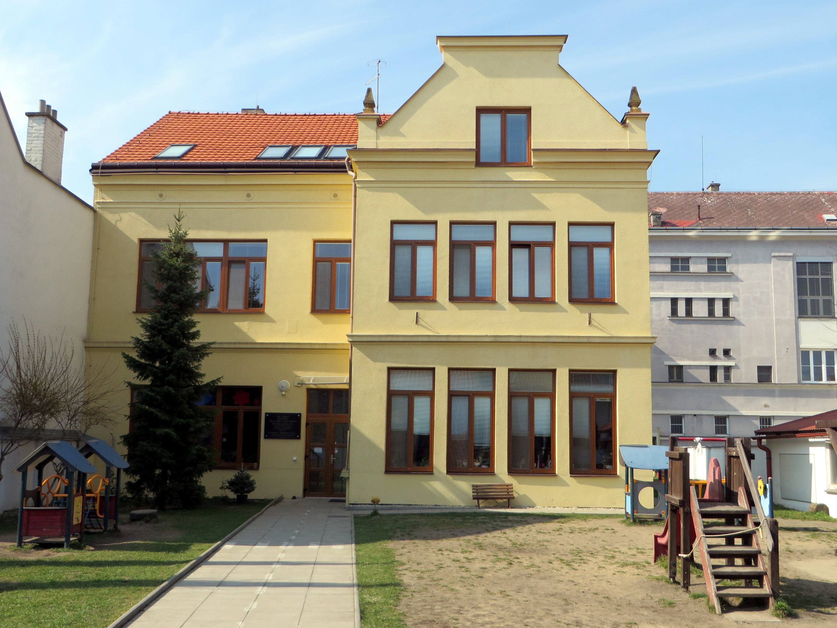 MŠ Proftova v Poděbradech. GPS: 50.1451300N, 15.1254917E